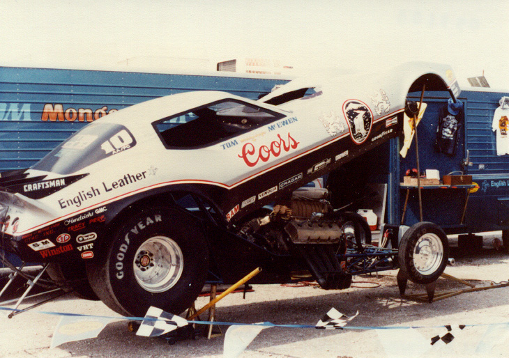 Tom McEwen dragster, St. Louis 1980Tom McEwen